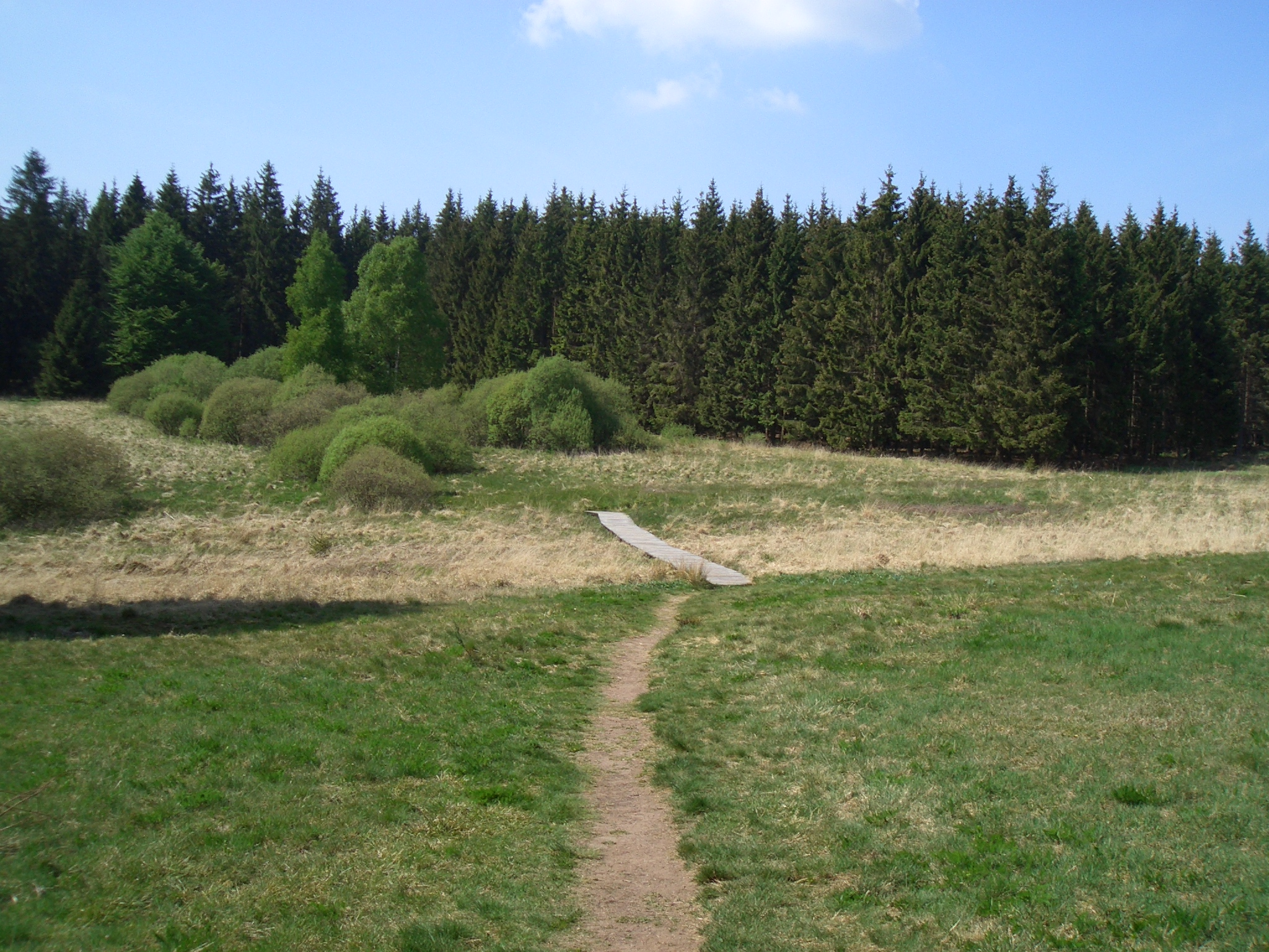 Steg in Belgien, der zum „Weißen Stein“ führt